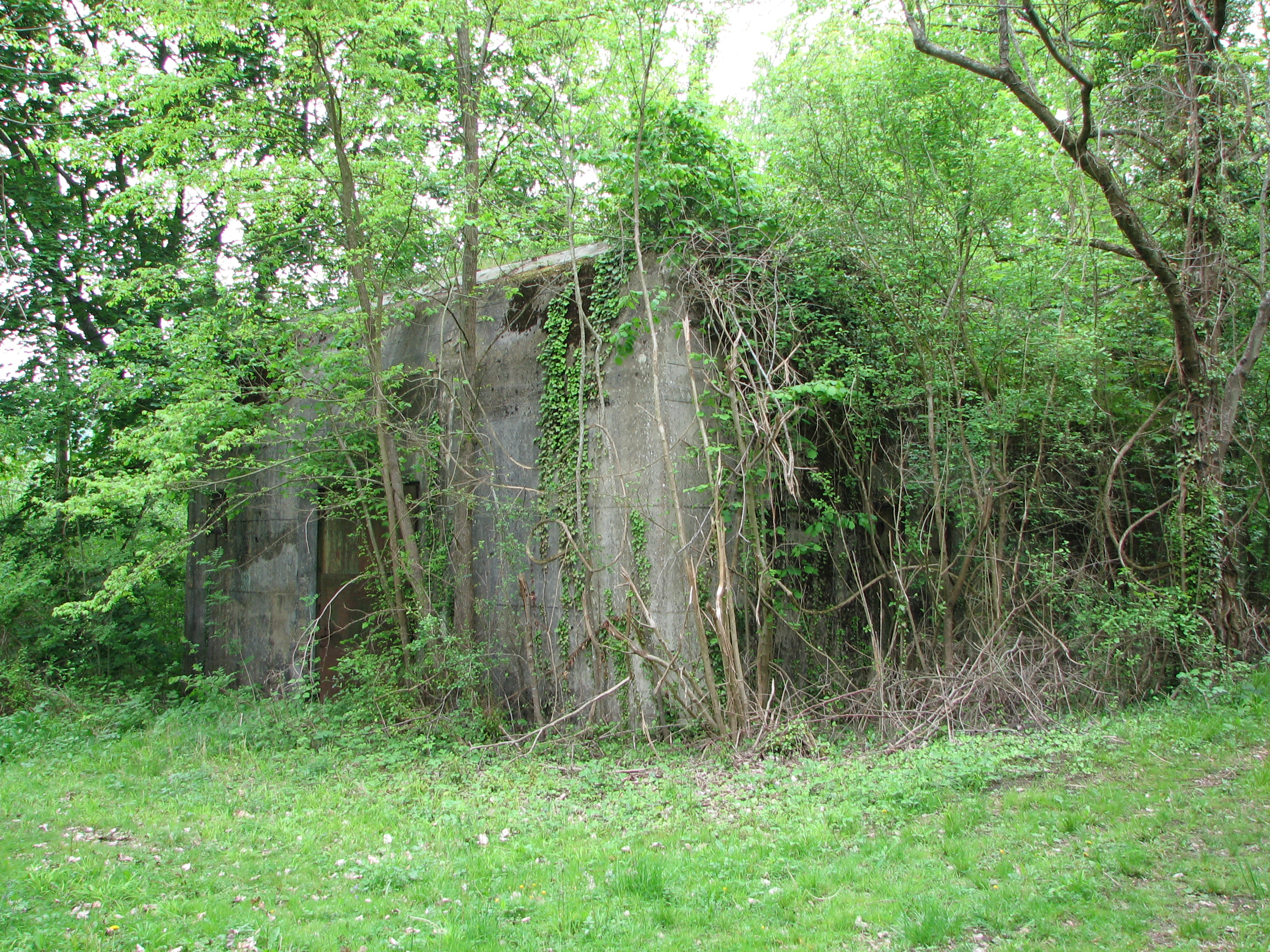 Un des bunkers du Wolfsschlucht II à Margival dans l'Aisne.